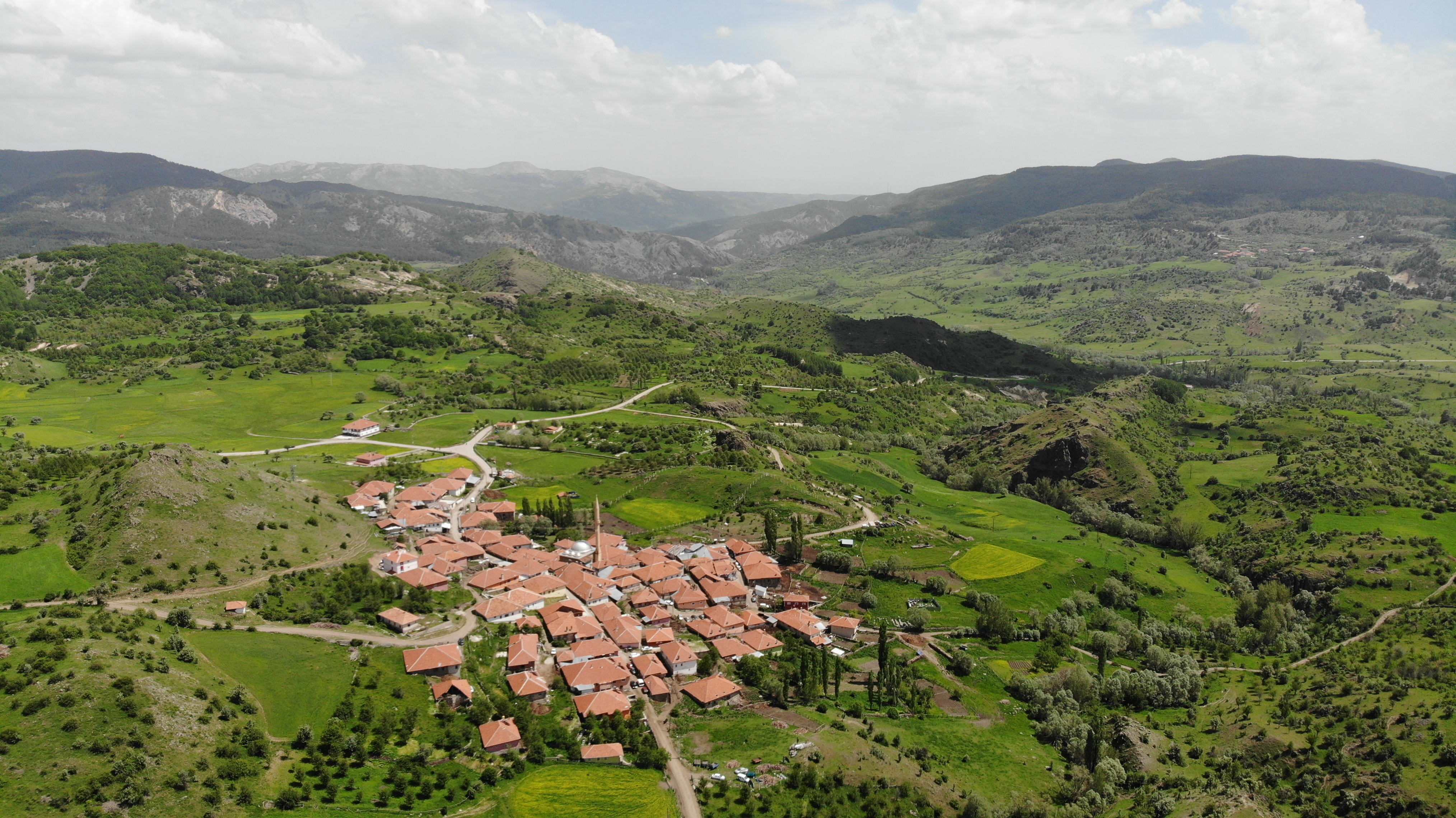 Köyün havadan görüntüsü